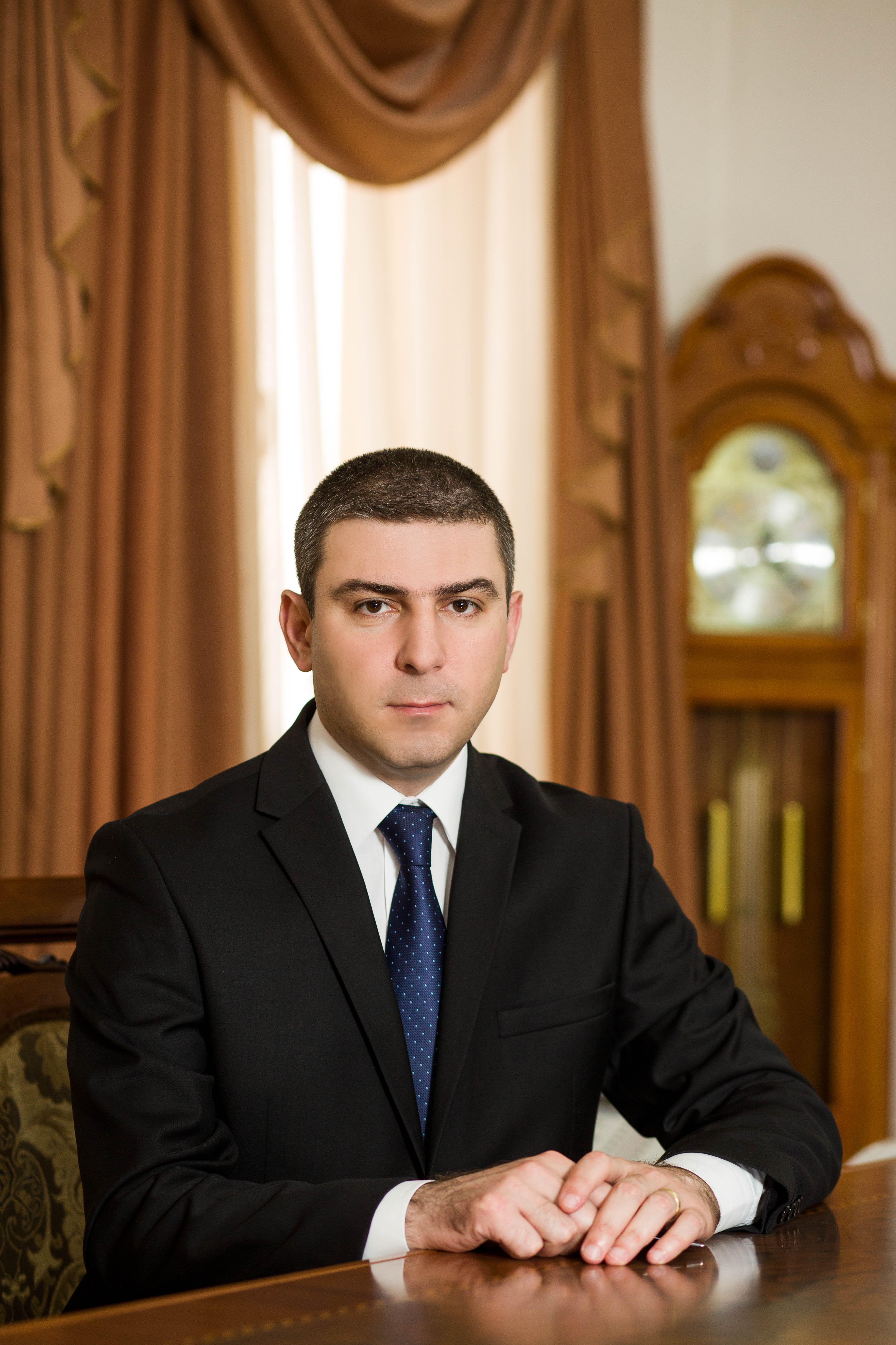 Գրիգորի Մարտիրոսյան